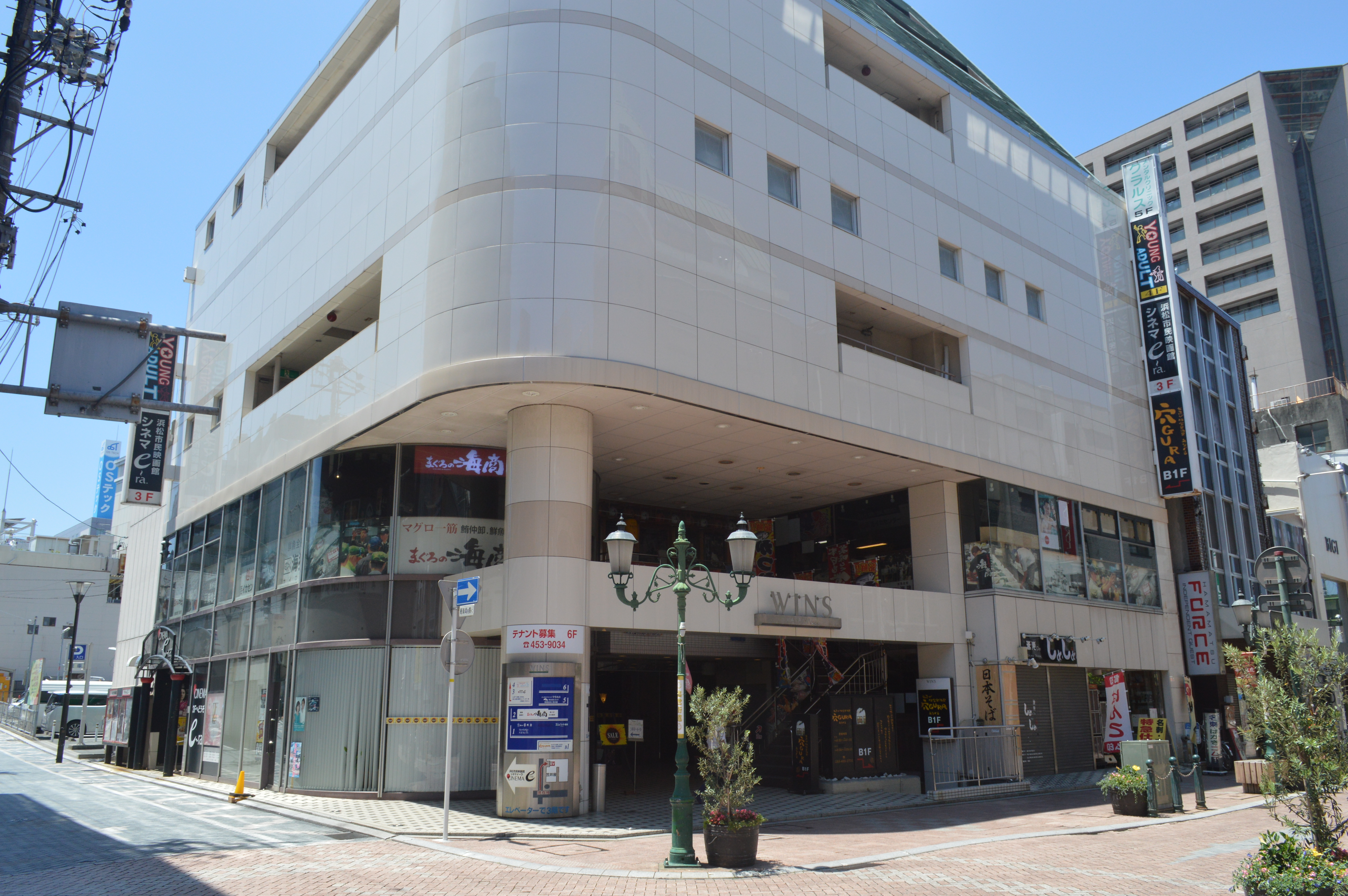 浜松市の中心市街地である田町にある笠井屋ビル。シネマイーラが入っている。